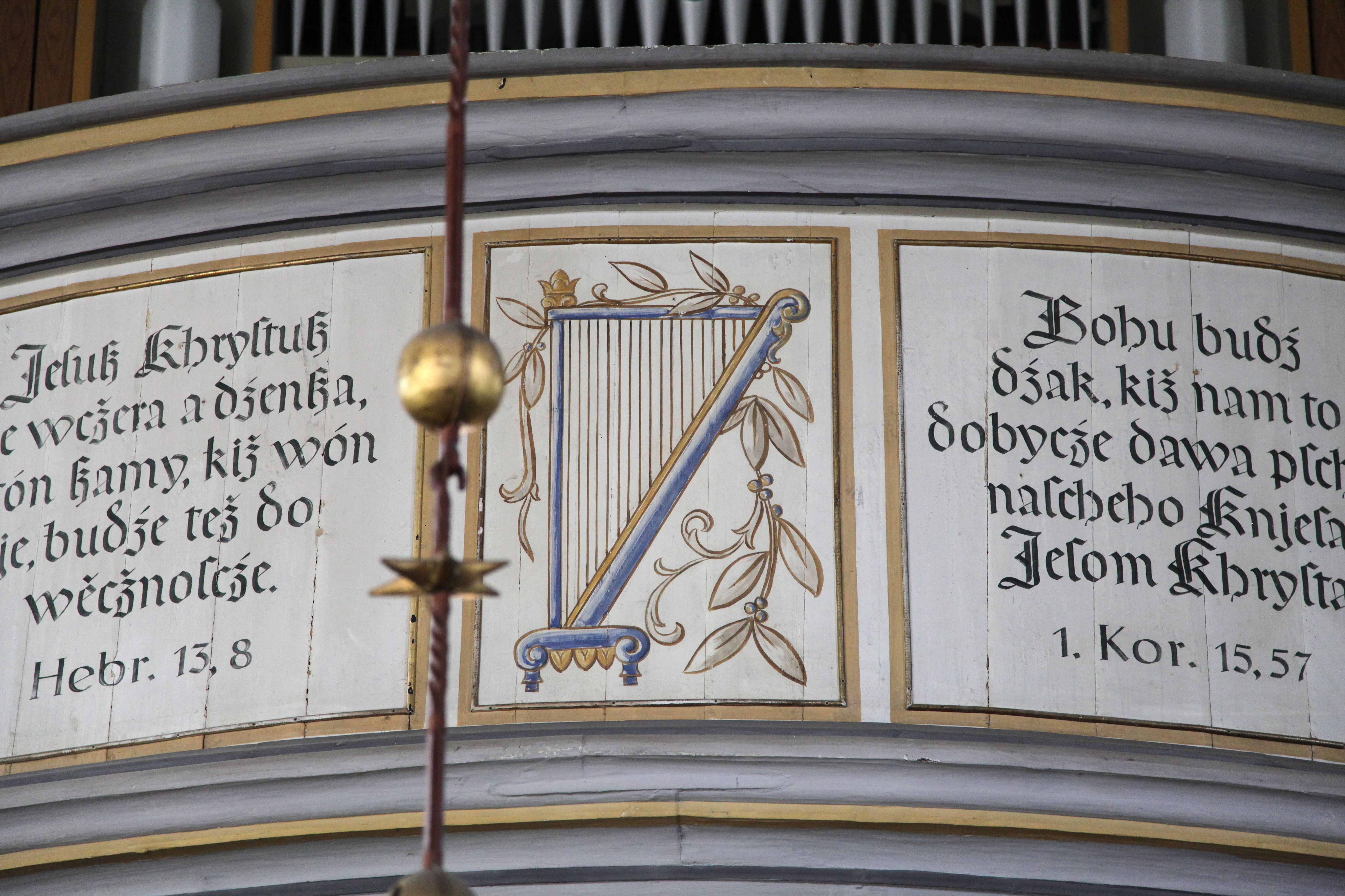 Kirche Kreba, Boxberger Straße in Kreba-Neudorf Hornjoserbsce: Ewangelska cyrkej w Chrjebi.